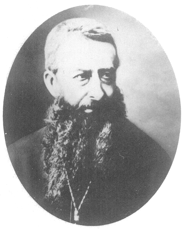 ピエール・オズーフ神父